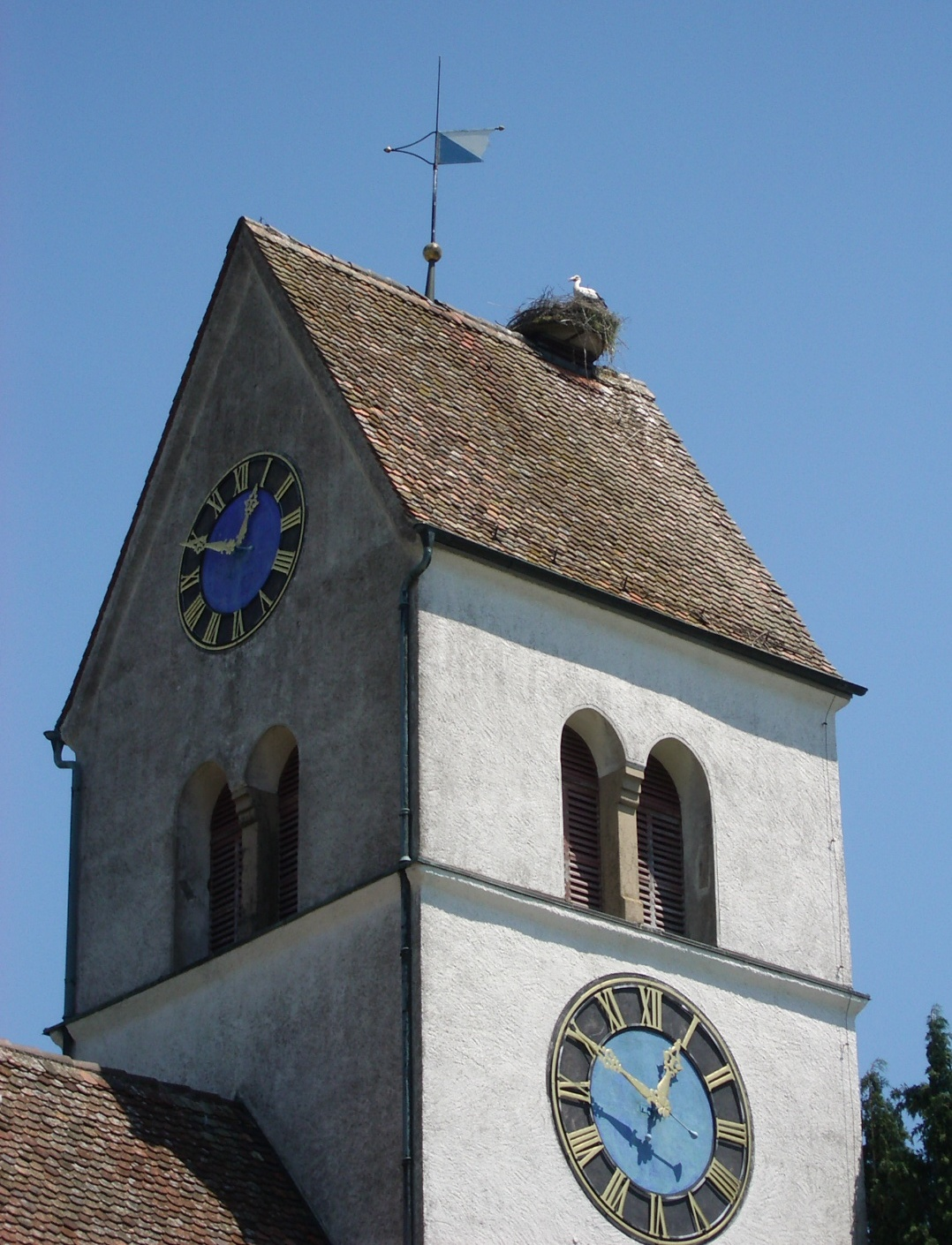 Steinmaur ZH, Switzerland